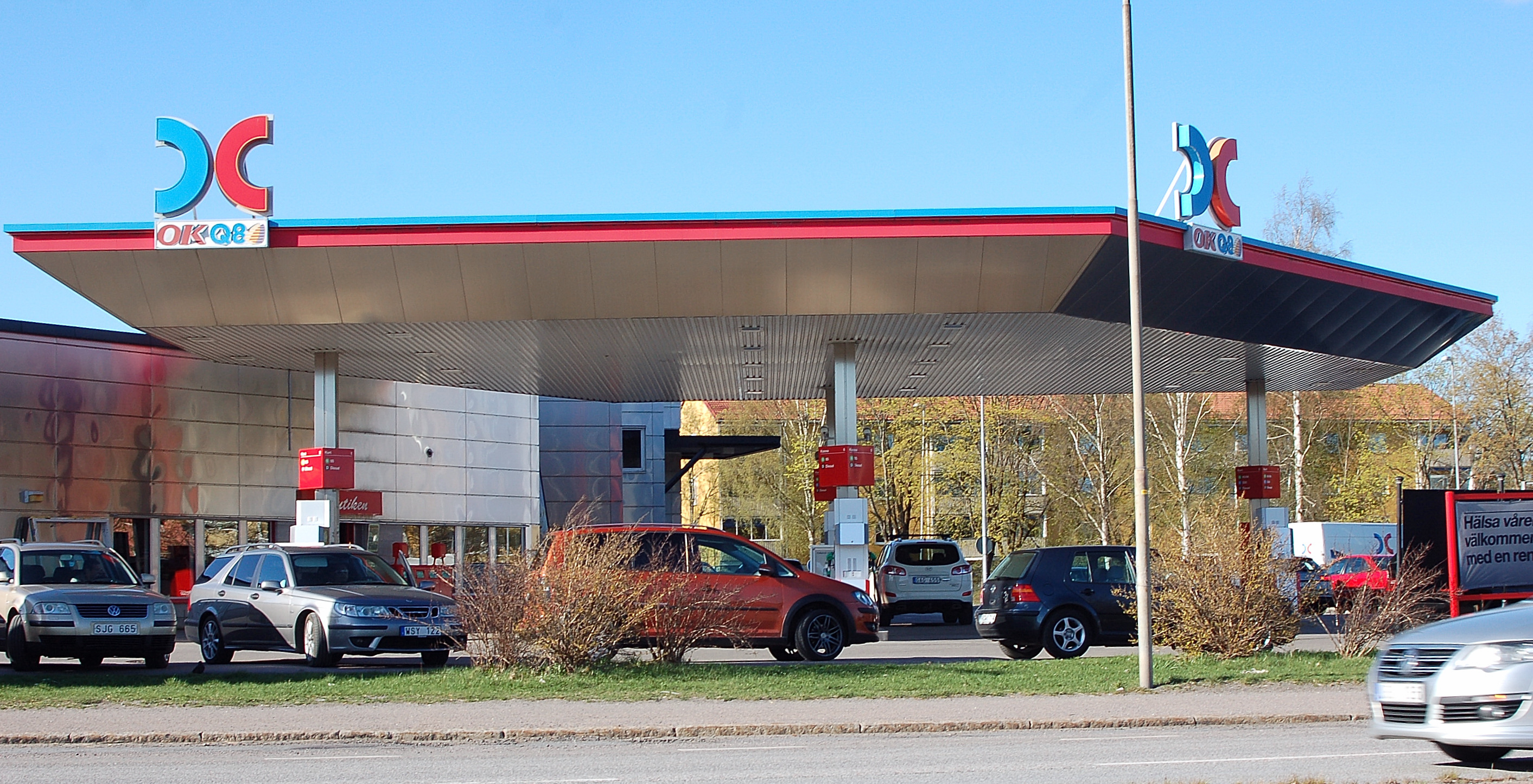 OKQ8s bränsledepå i Skranta, Karlskoga.